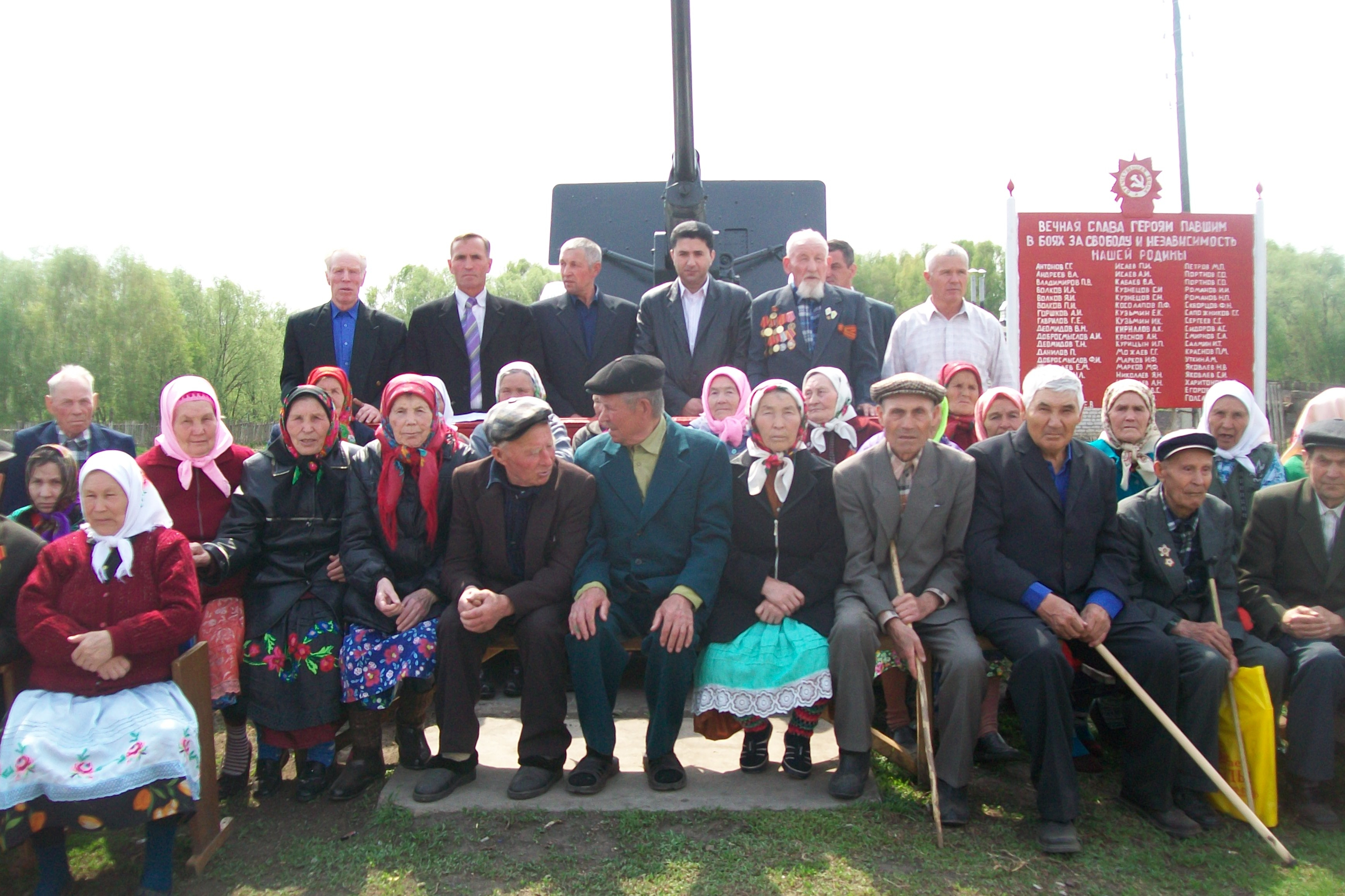 День Победы